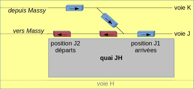 Schéma d'organisation du quai JH de Versailles Chantiers suite au prolongement du TTME